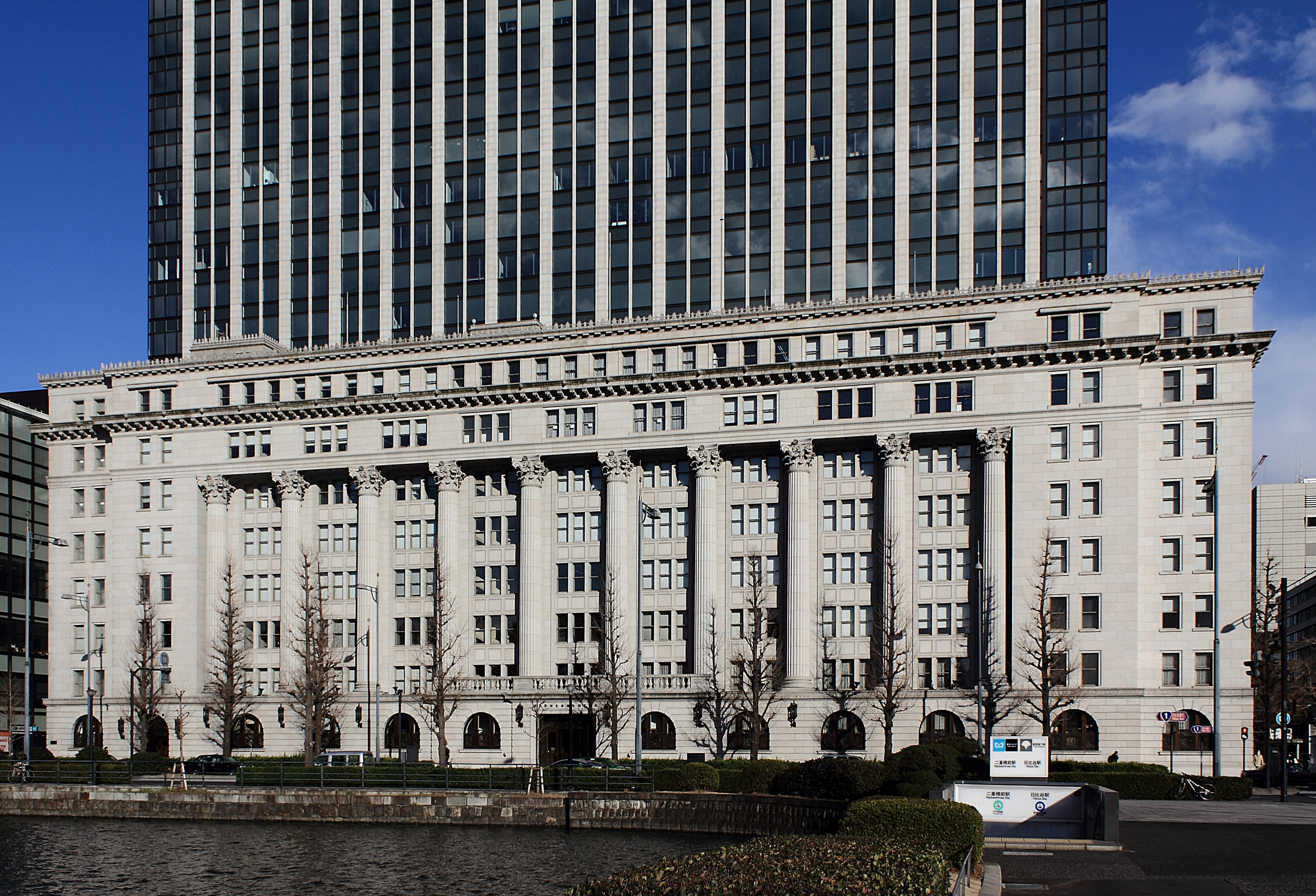 明治生命館。明治安田生命本社ビル。重要文化財、東京都千代田区。